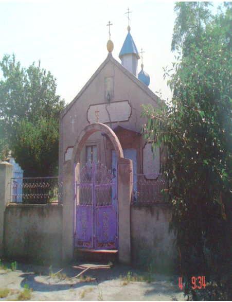 VSergo11